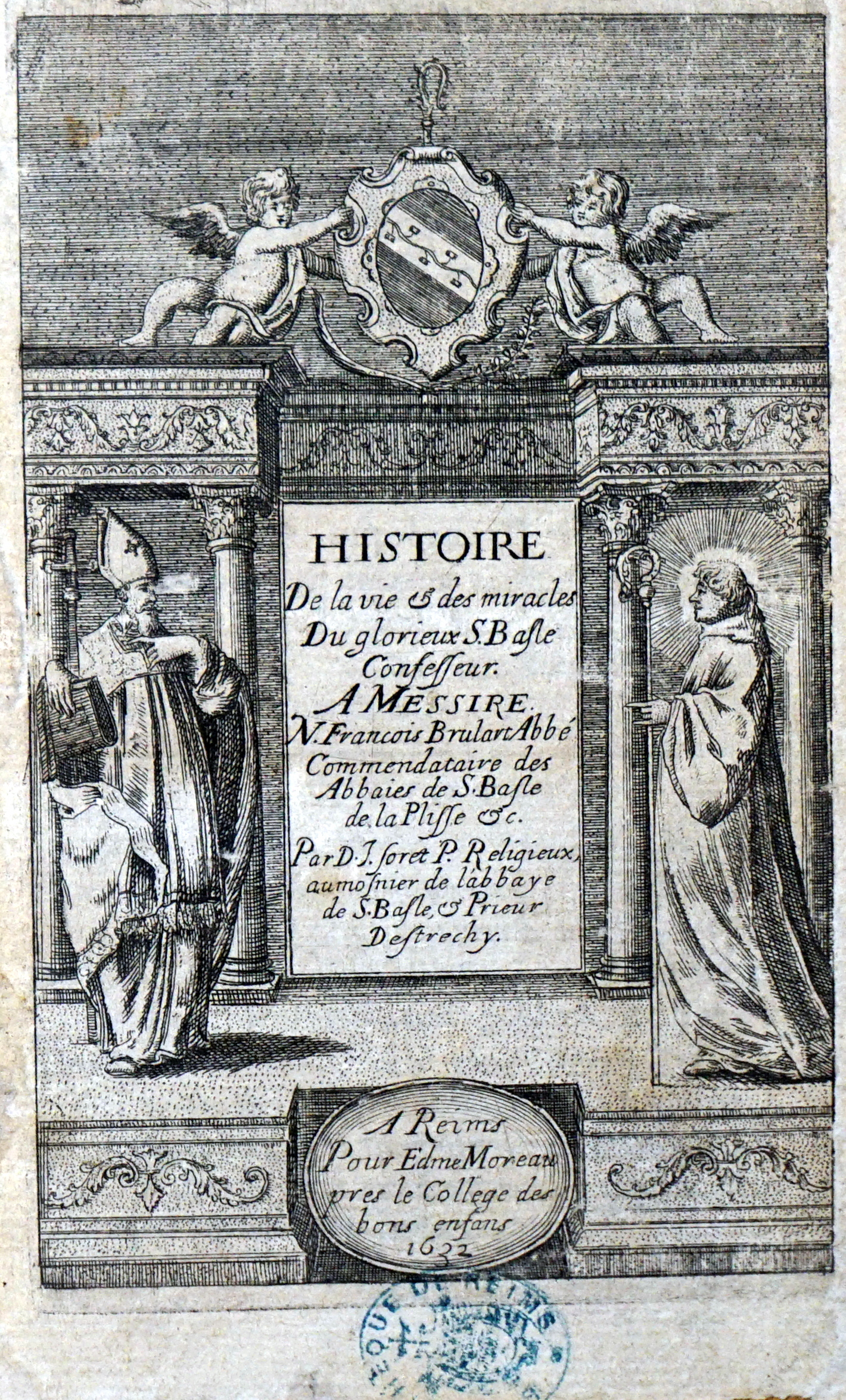 histoire de Bales de Verzy.